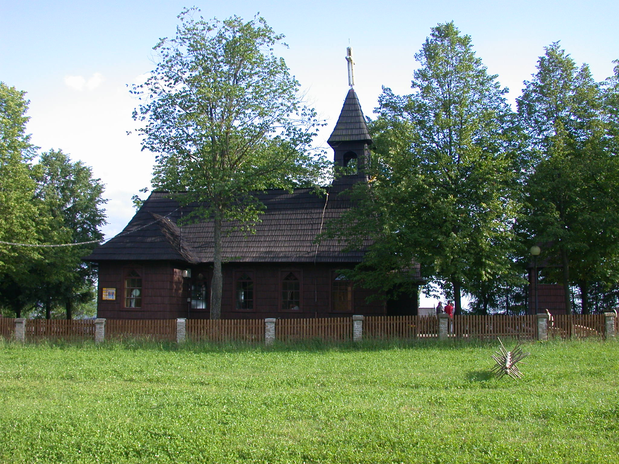 Drewniany kościół w Istebnej - Stecówce z XX wieku.